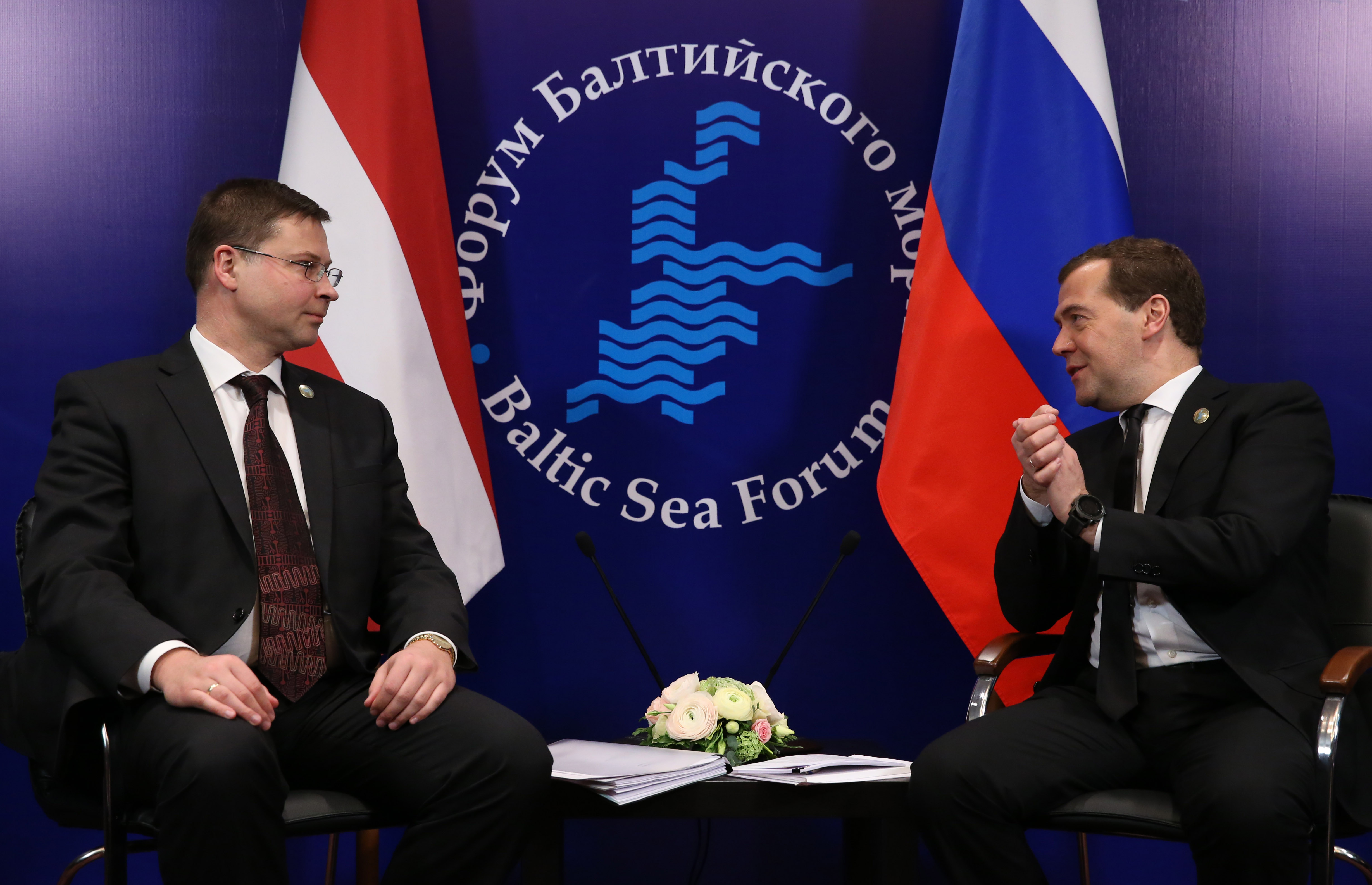 Ministru prezidents Valdis Dombrovskis tiekas ar Krievijas premjerministru Dmitriju Medvedevu